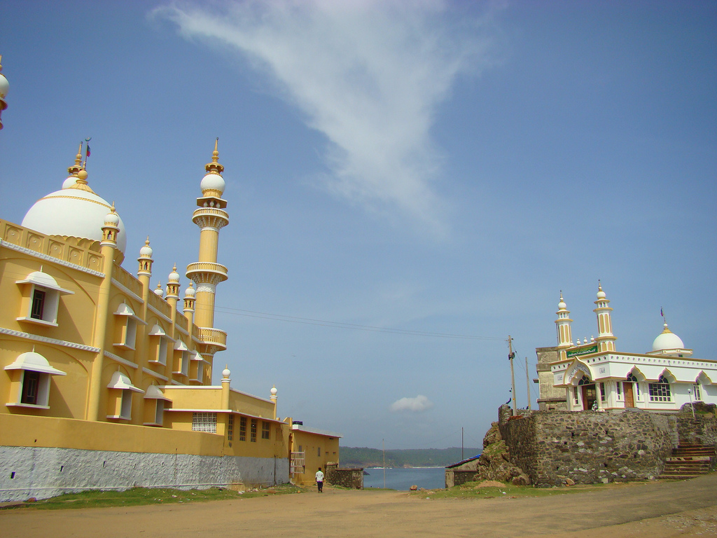 from Vizhinjam, Trivandrum.